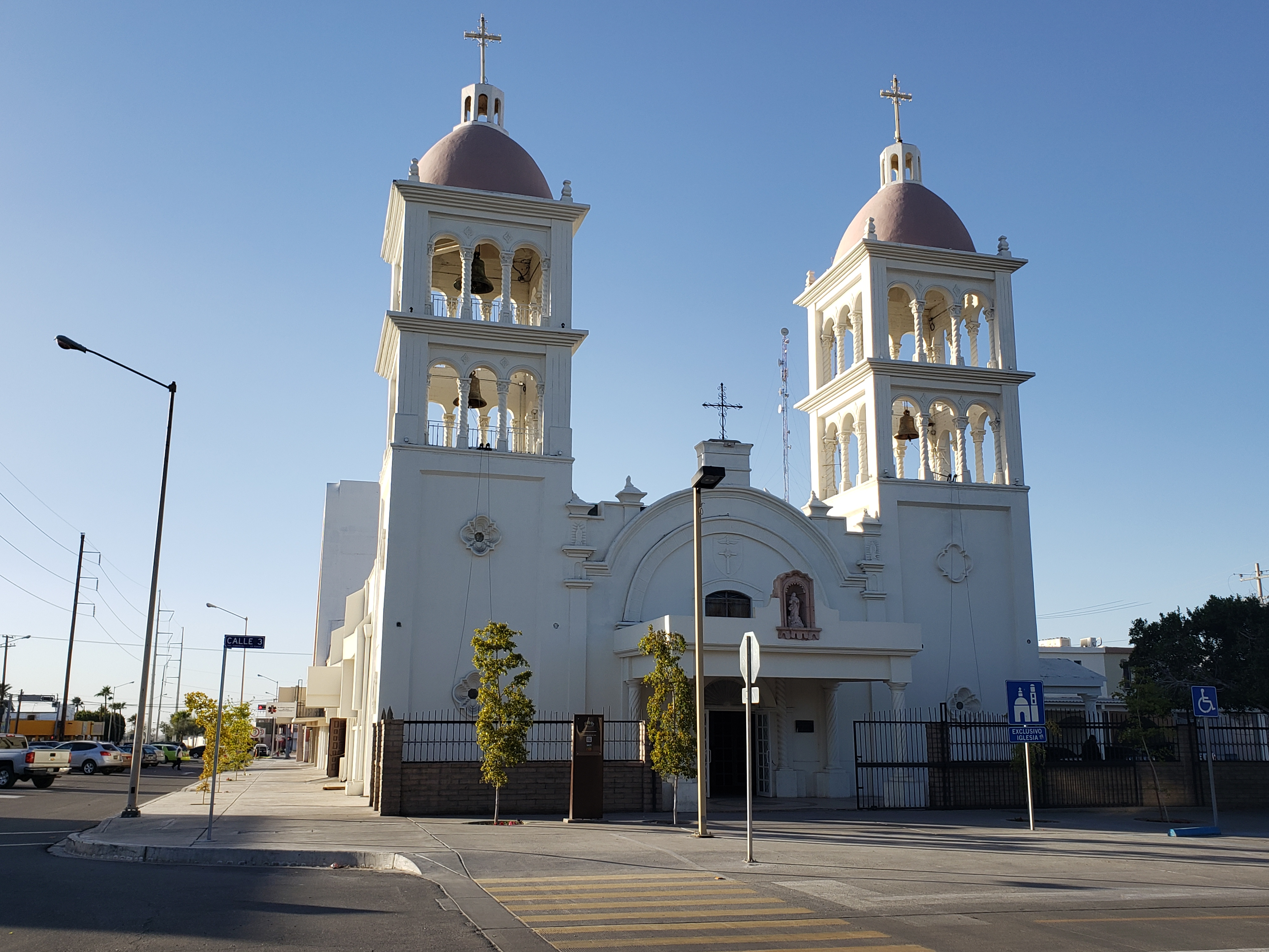 Antigua Iglesia Inmaculada Concepción en San Luis Río Colorado, Sonora.